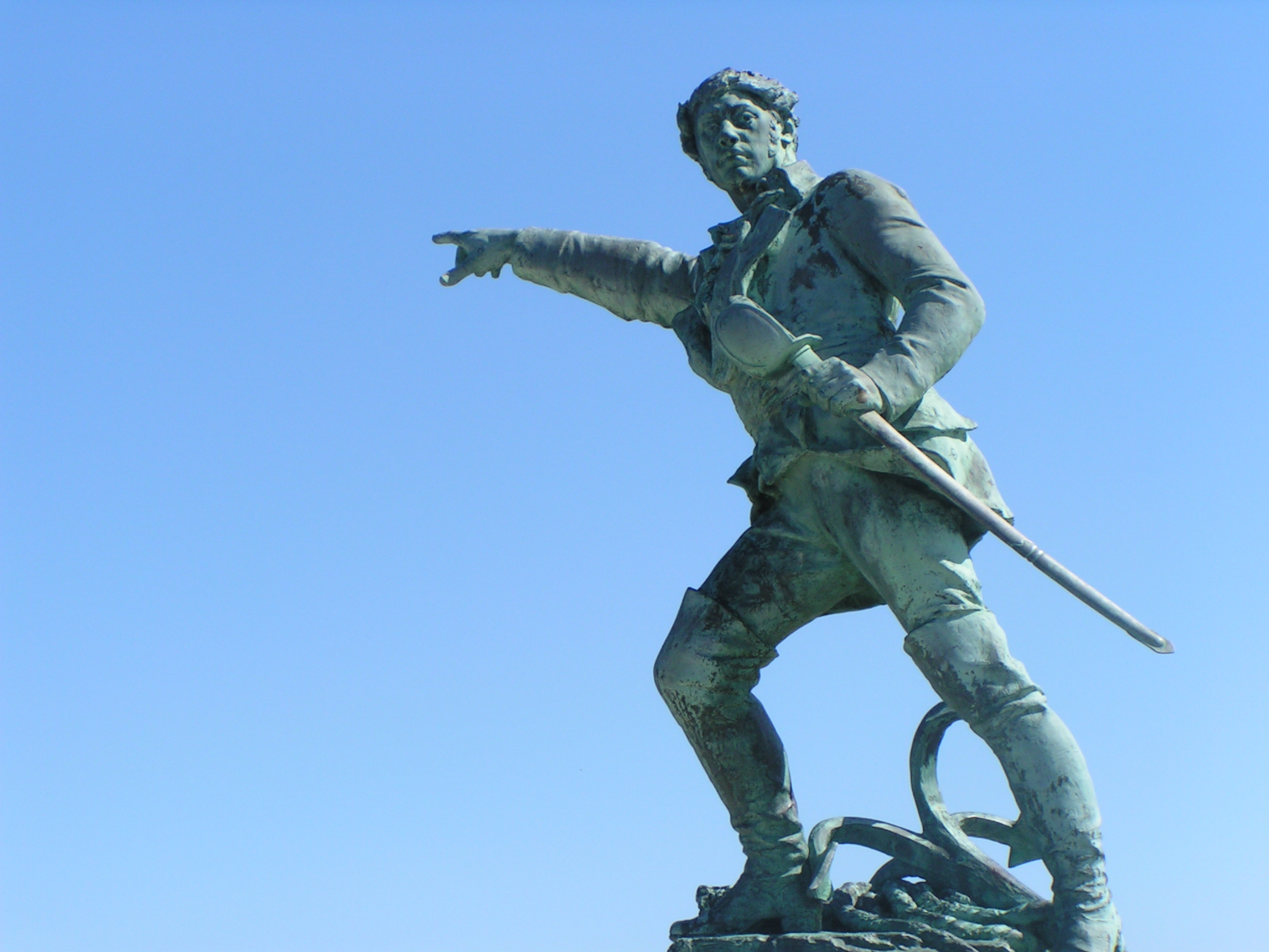 Statue de Robert Surcouf à Saint-Malo, sculptée par Alfred Caravaniez